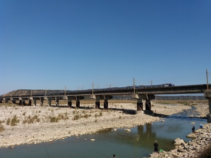 海線鐵路下大甲溪橋 was filmed by TDCKW on 20190207